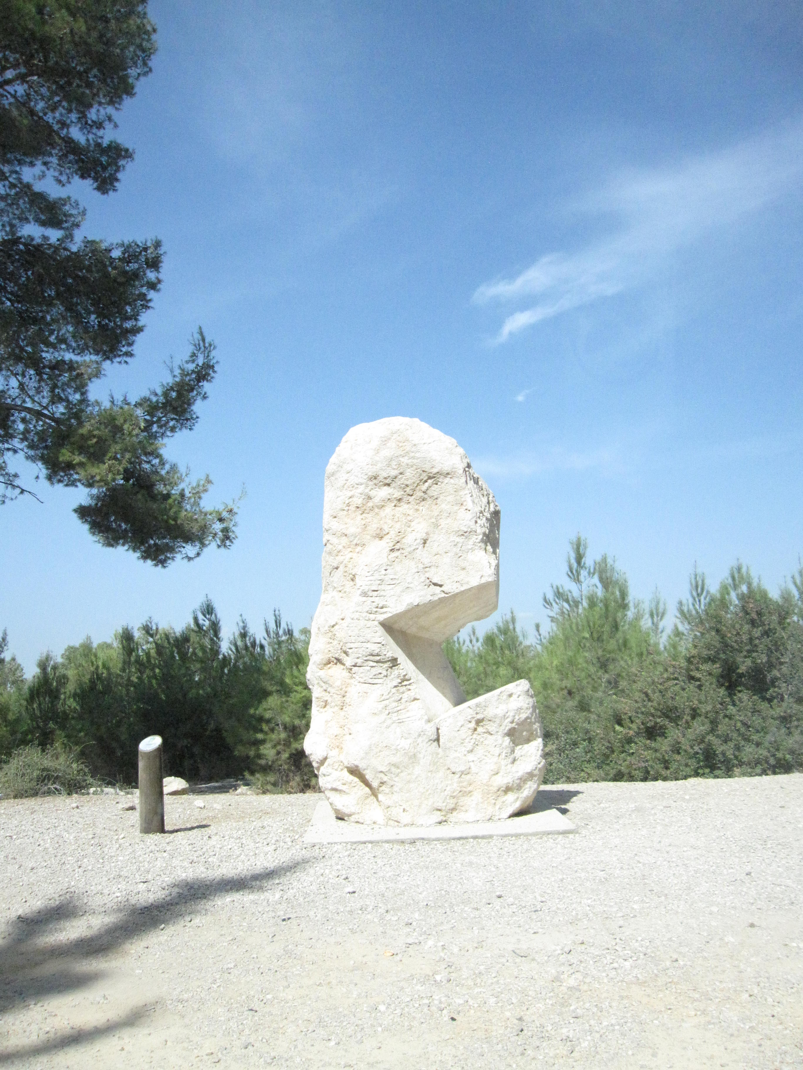 אחד מהפסלים ביער צרעה